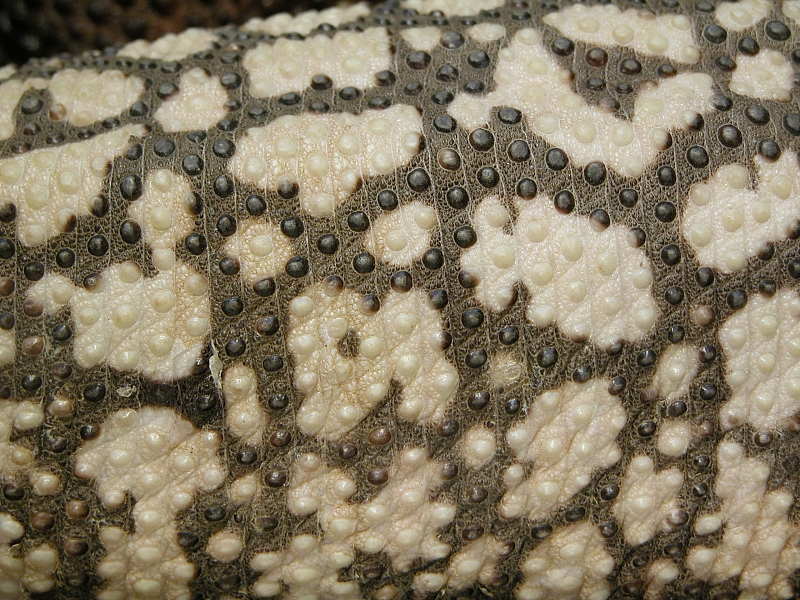 Haut eines Gila Monsters (Heloderma spec.), Zoo Frankfurt am Main, Germany